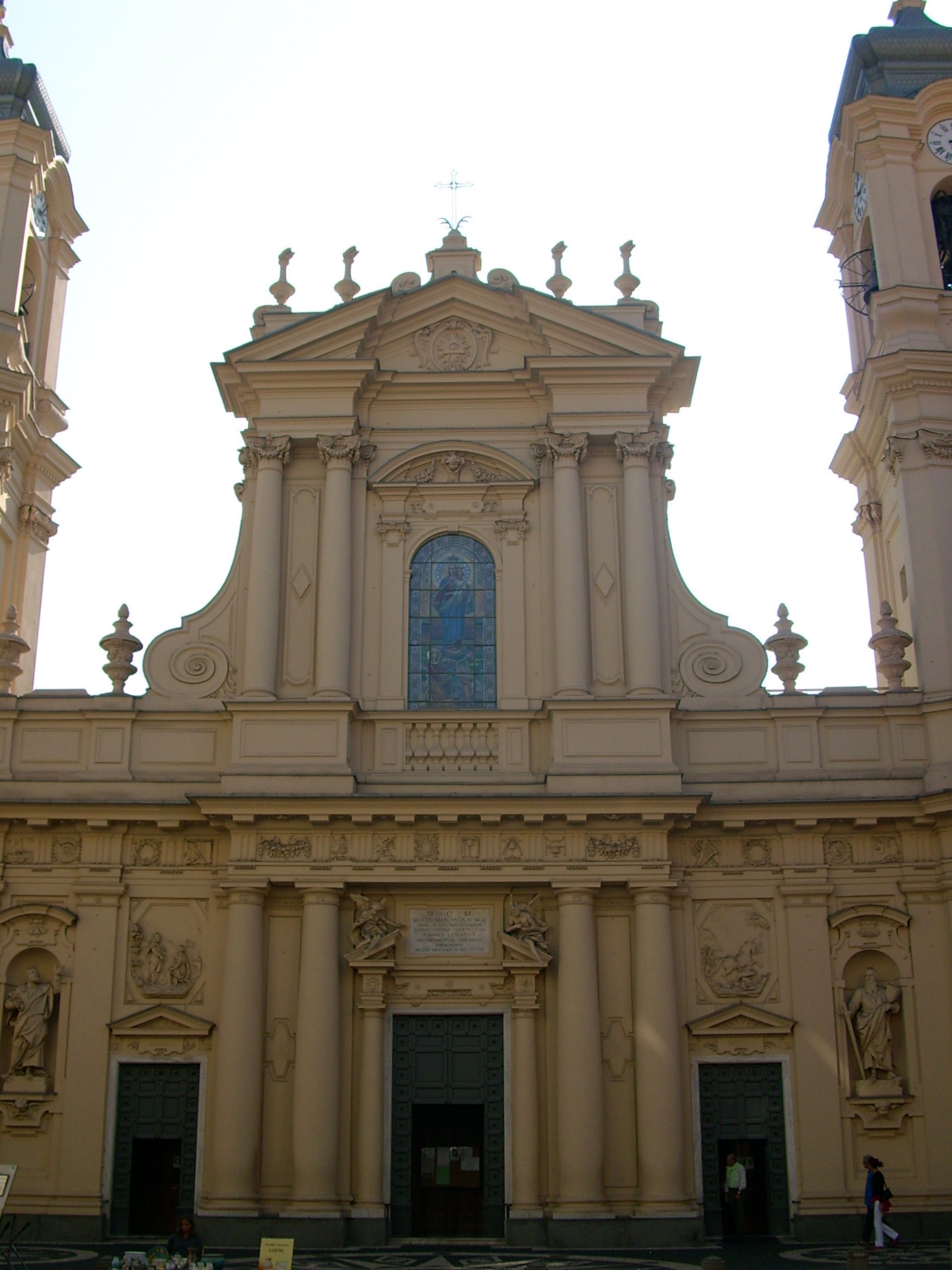 Basilica di Santa Margherita di Antiochia di Santa Margherita Ligure, Liguria, Italia